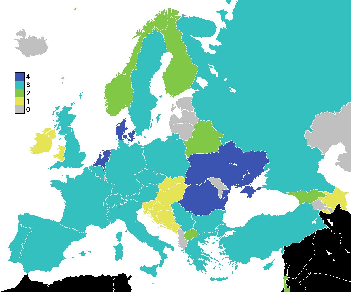 Кількість команд за національними чемпіонатами у Лізі Європи 2010-2011 перед 3-ім раундом турніру